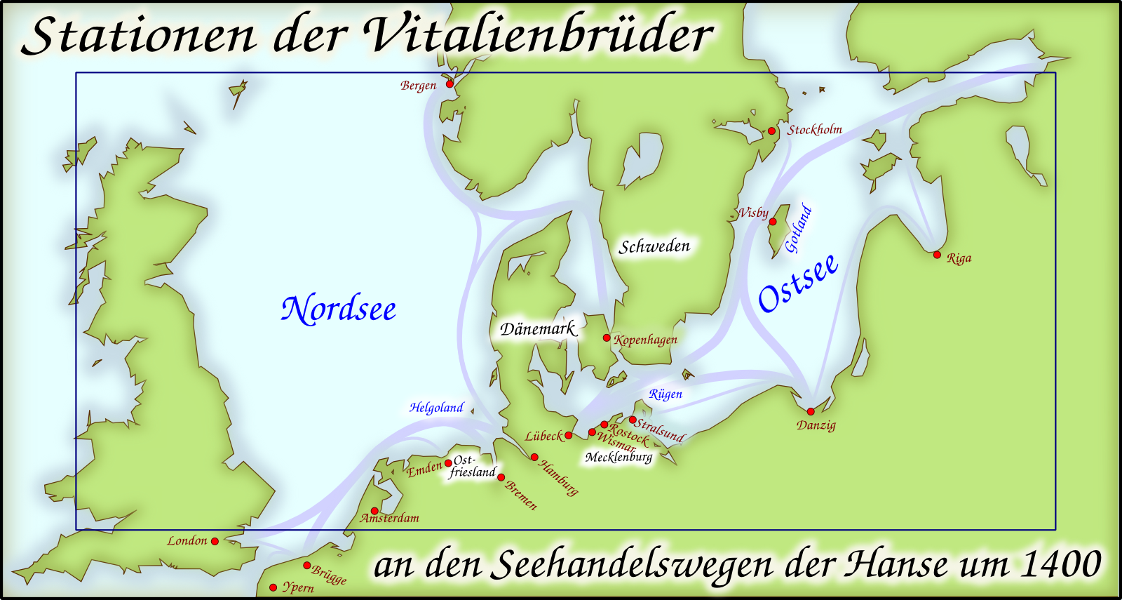 Der Nord- und Ostseeraum um 1400 mit relevanten Orten im Zusammenhang mit den Vitalienbrüdern